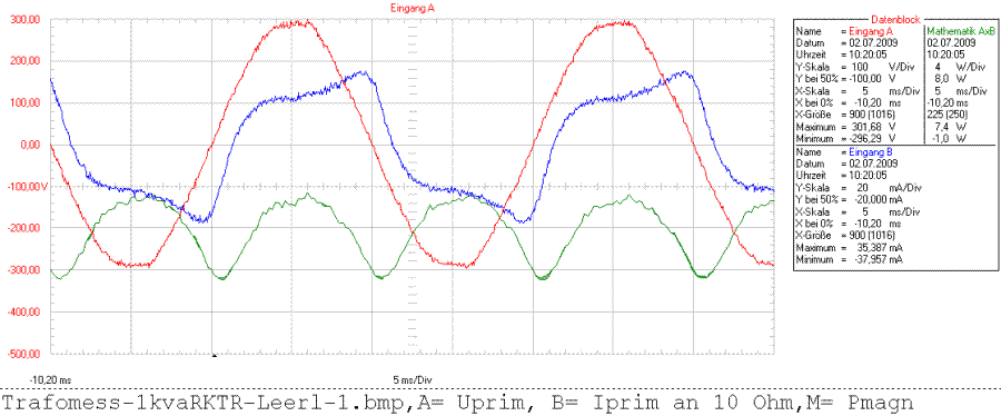 Messungen an Ringkerntrafo, Leerlaufstrom und Magnetisierungsleistung